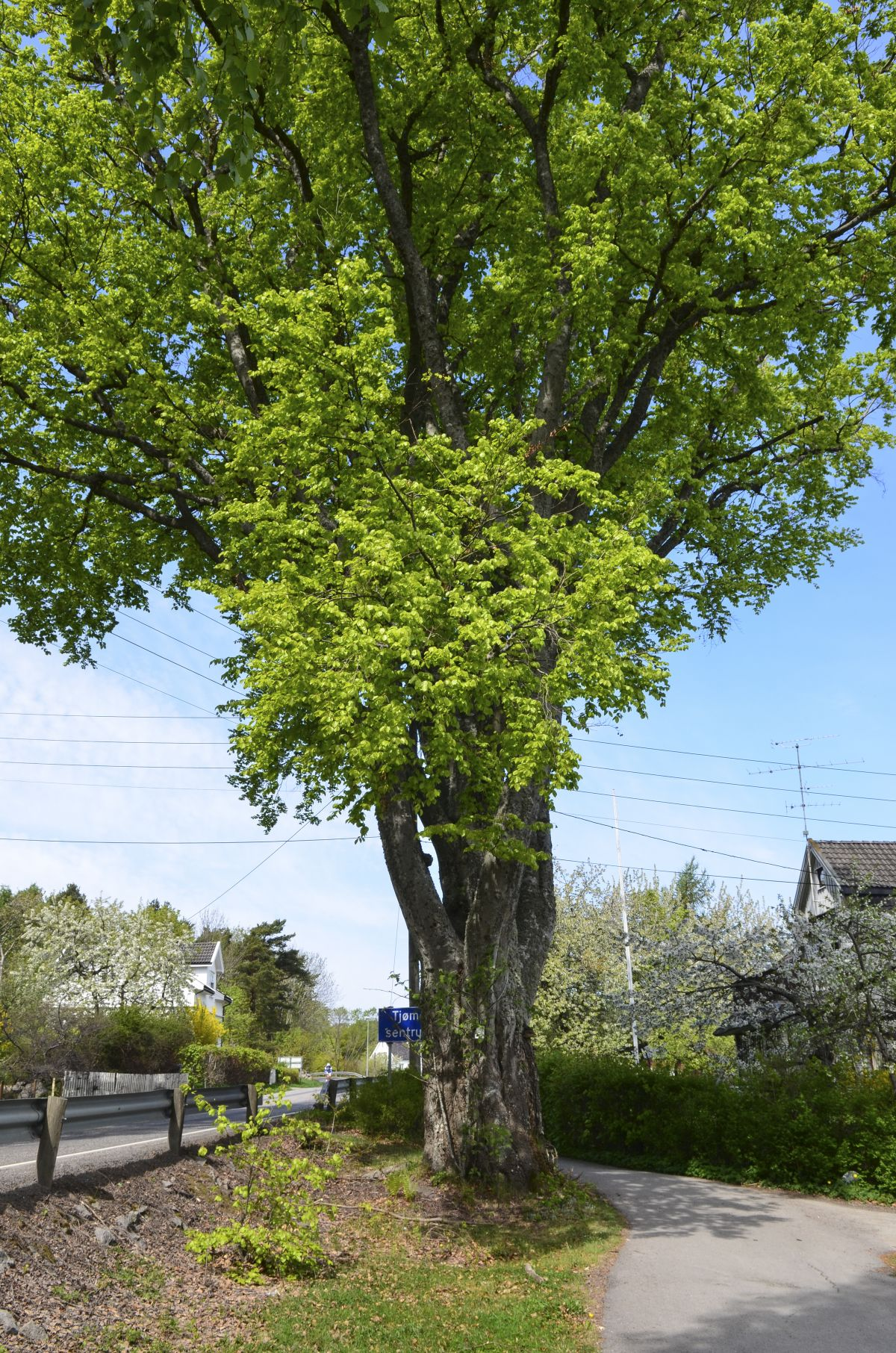 Bøketreet på Lindhøy.